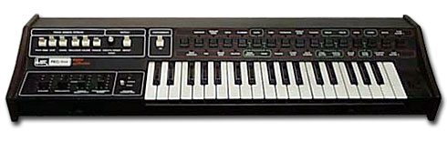 sintetizzatore ARP Pro/DGX Licensing Categoria:Sintetizzatori Categoria:Sintetizzatori ARP